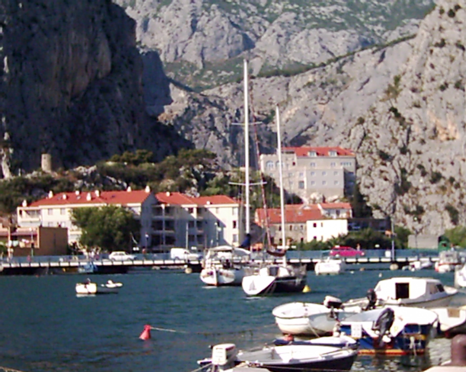 Omiš